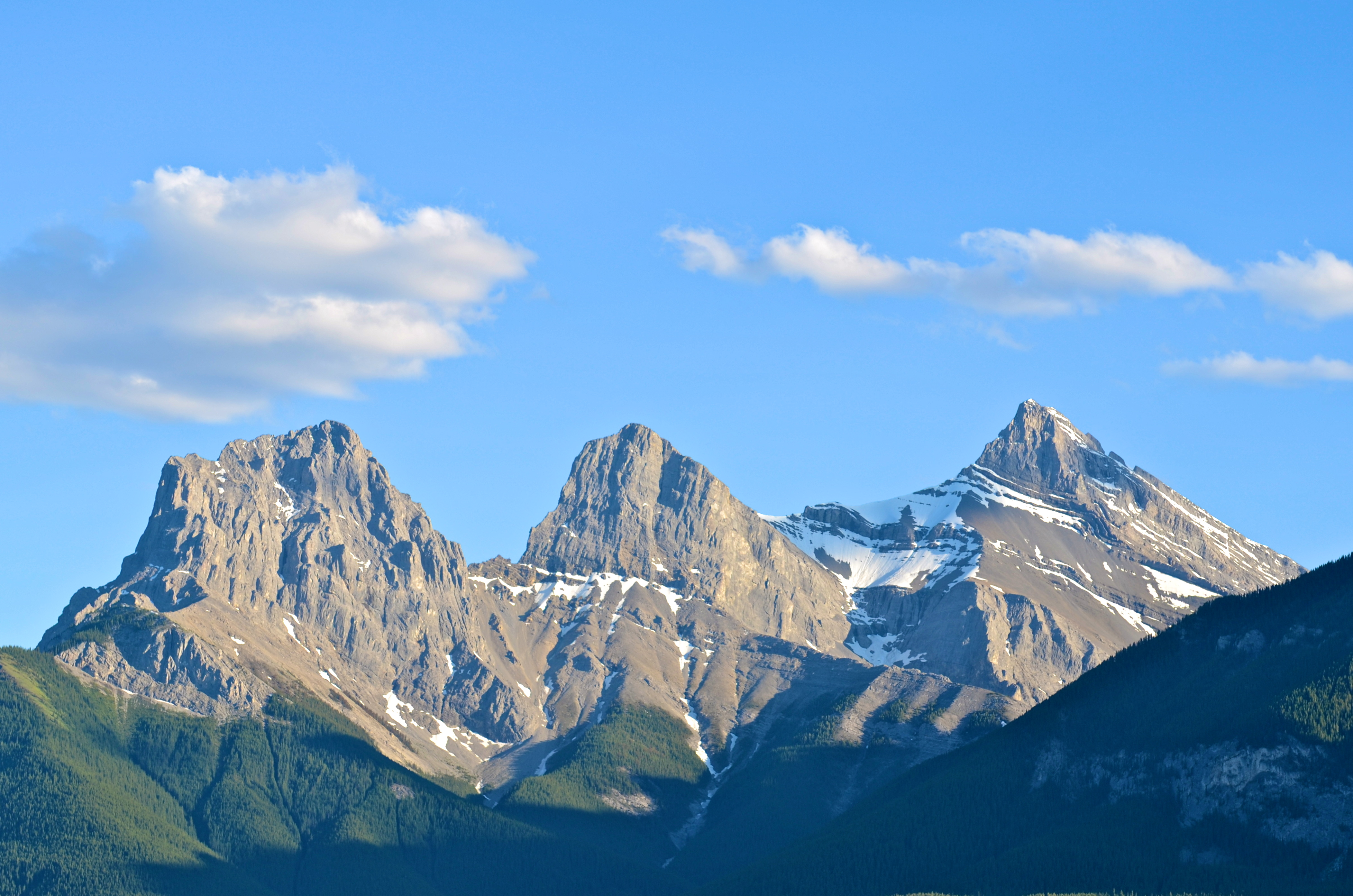 Three Sisters